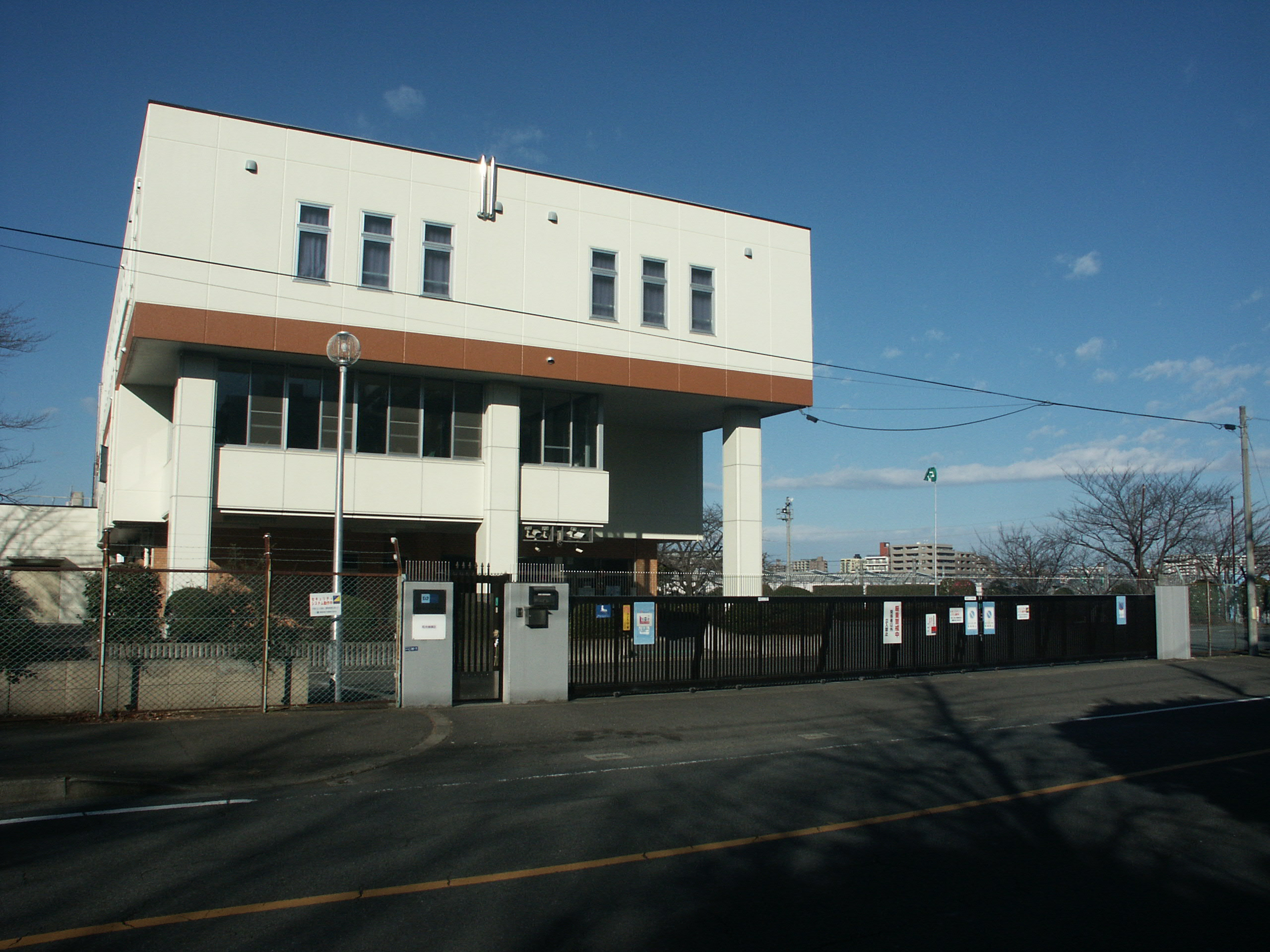 東京地下鉄和光検車区（入口の門付近を撮影）